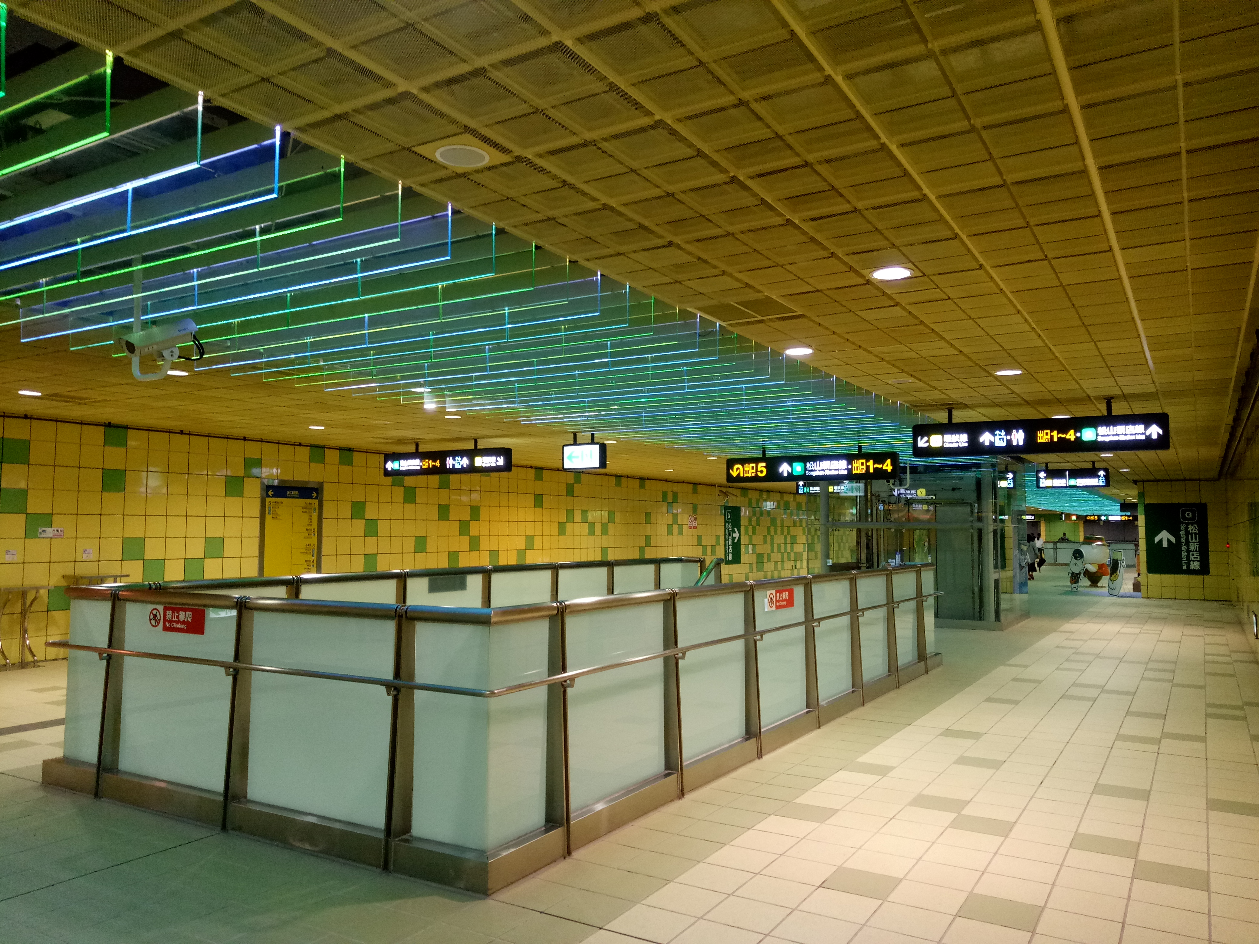 捷運大坪林站環狀線與松山新店線的連通道。